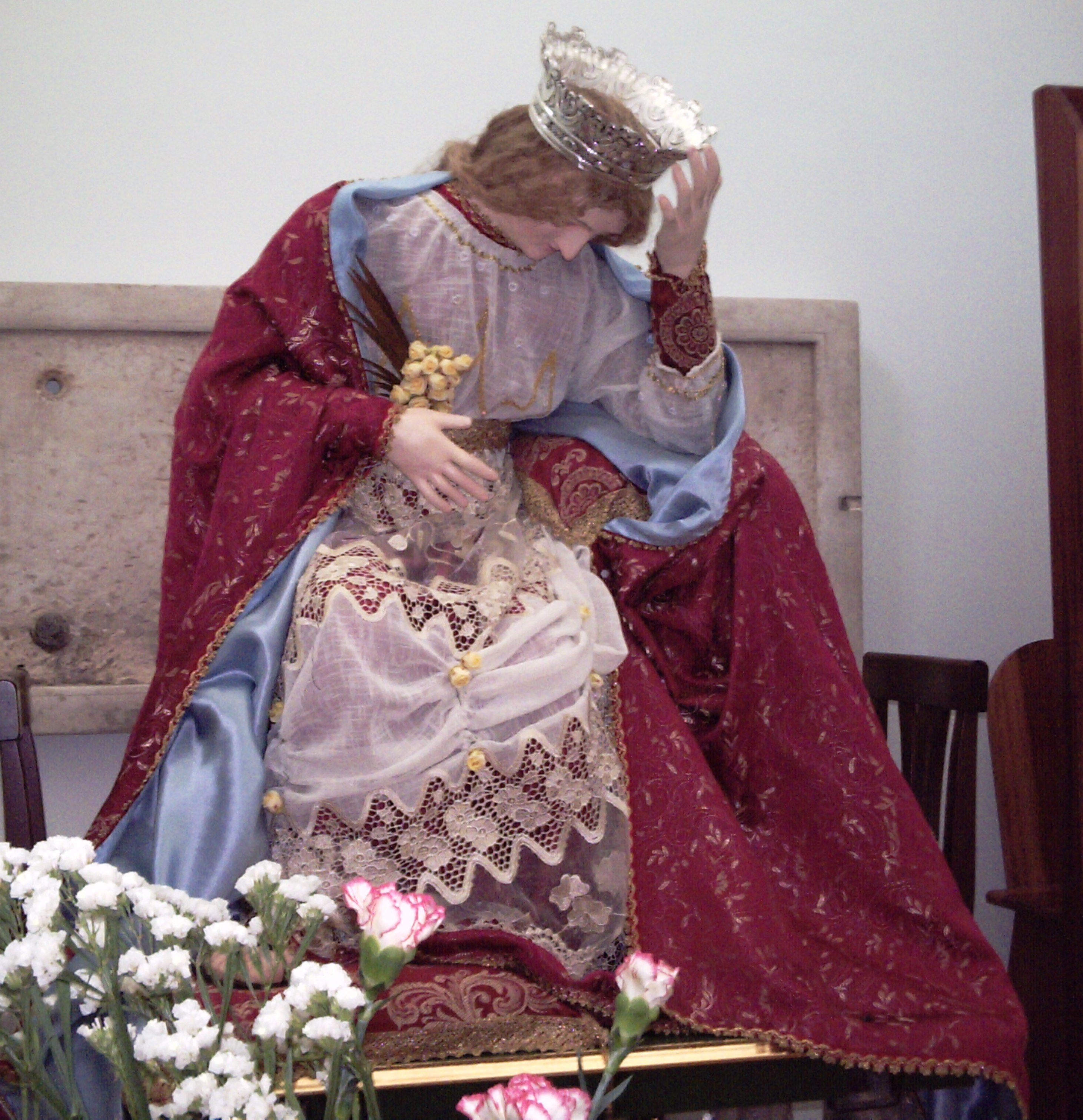 Statua lignea di Santa Caratisa, salvatasi al terremoto del 5 giugno 1688 e conservata nella chiesa di Sant'Antonio in Cerreto Sannita (provincia di Benevento).